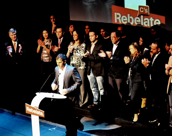 Acto de presentación de campaña para las elecciones autonómicas de 2010.